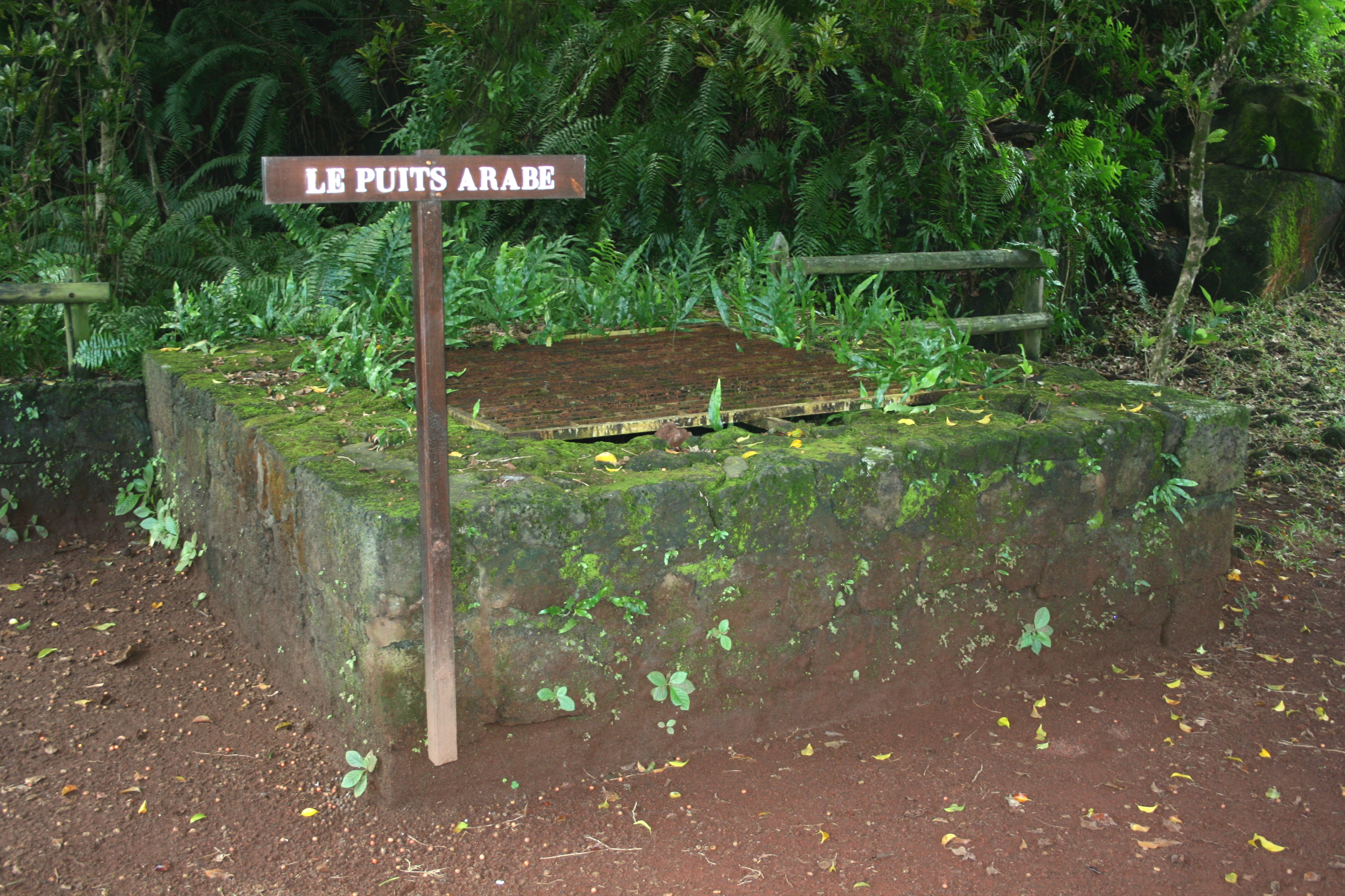 Vue du Puits Arabe, à Saint-Philippe de La Réunion.